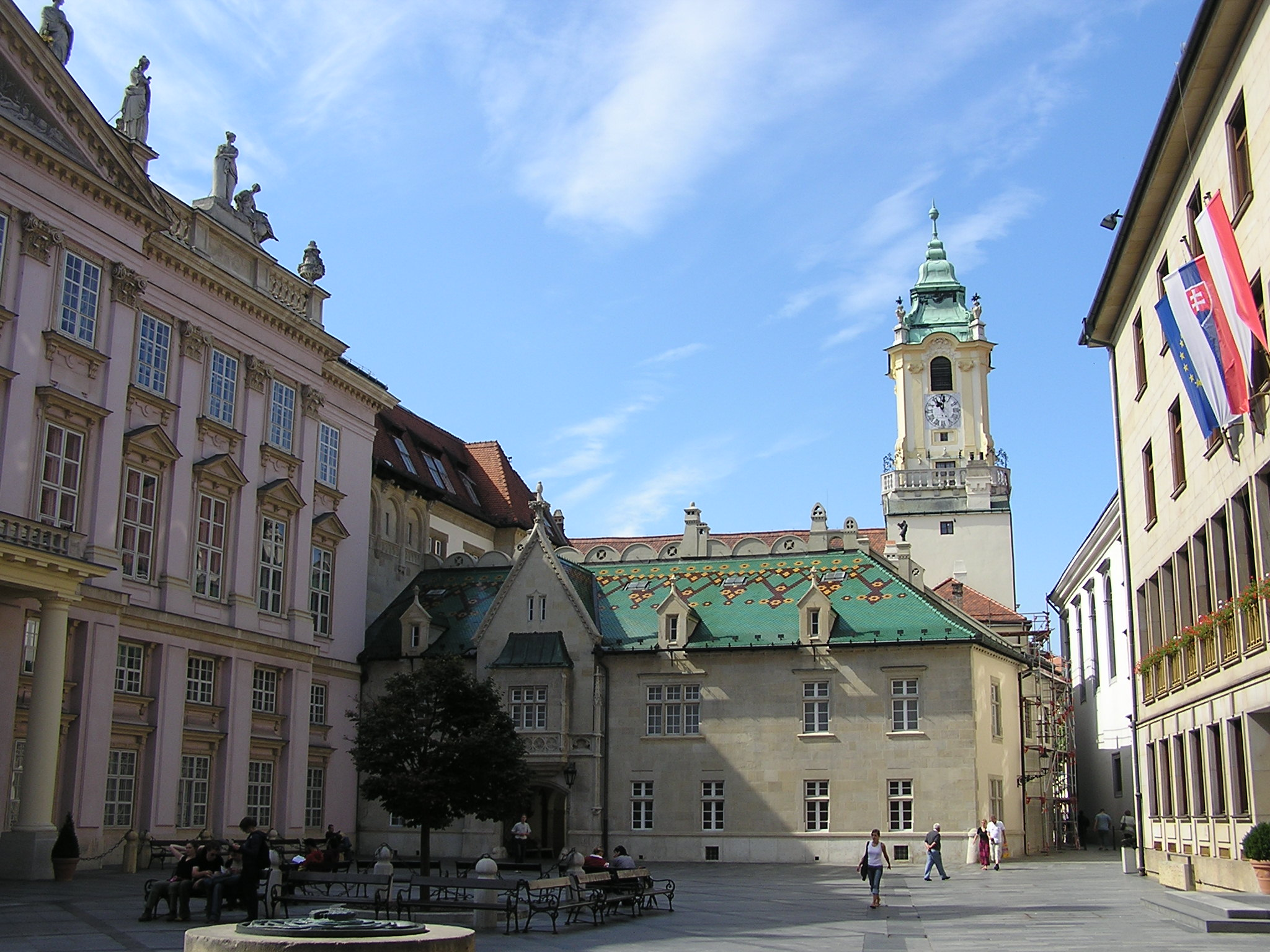 Pozsony. Középen a régi városháza, balra a prímási palota.